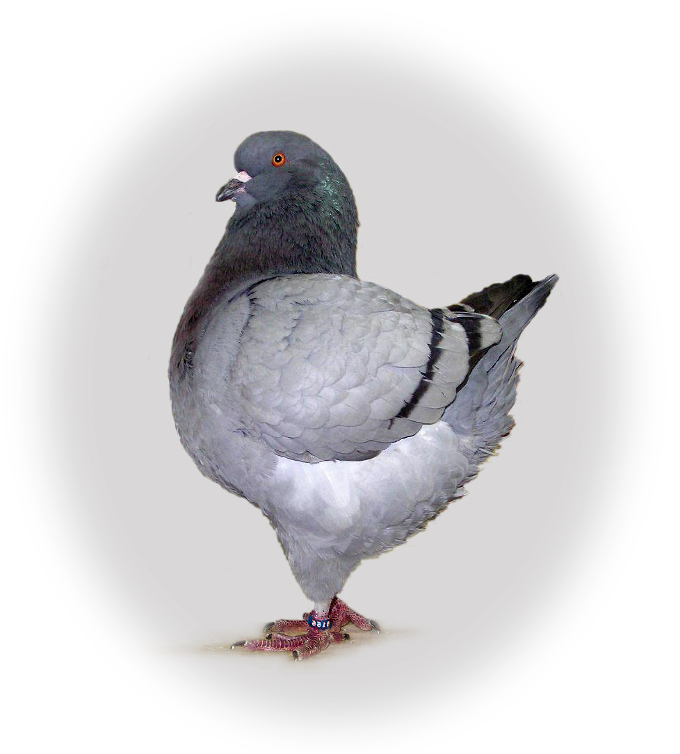 King (Blue Bar)